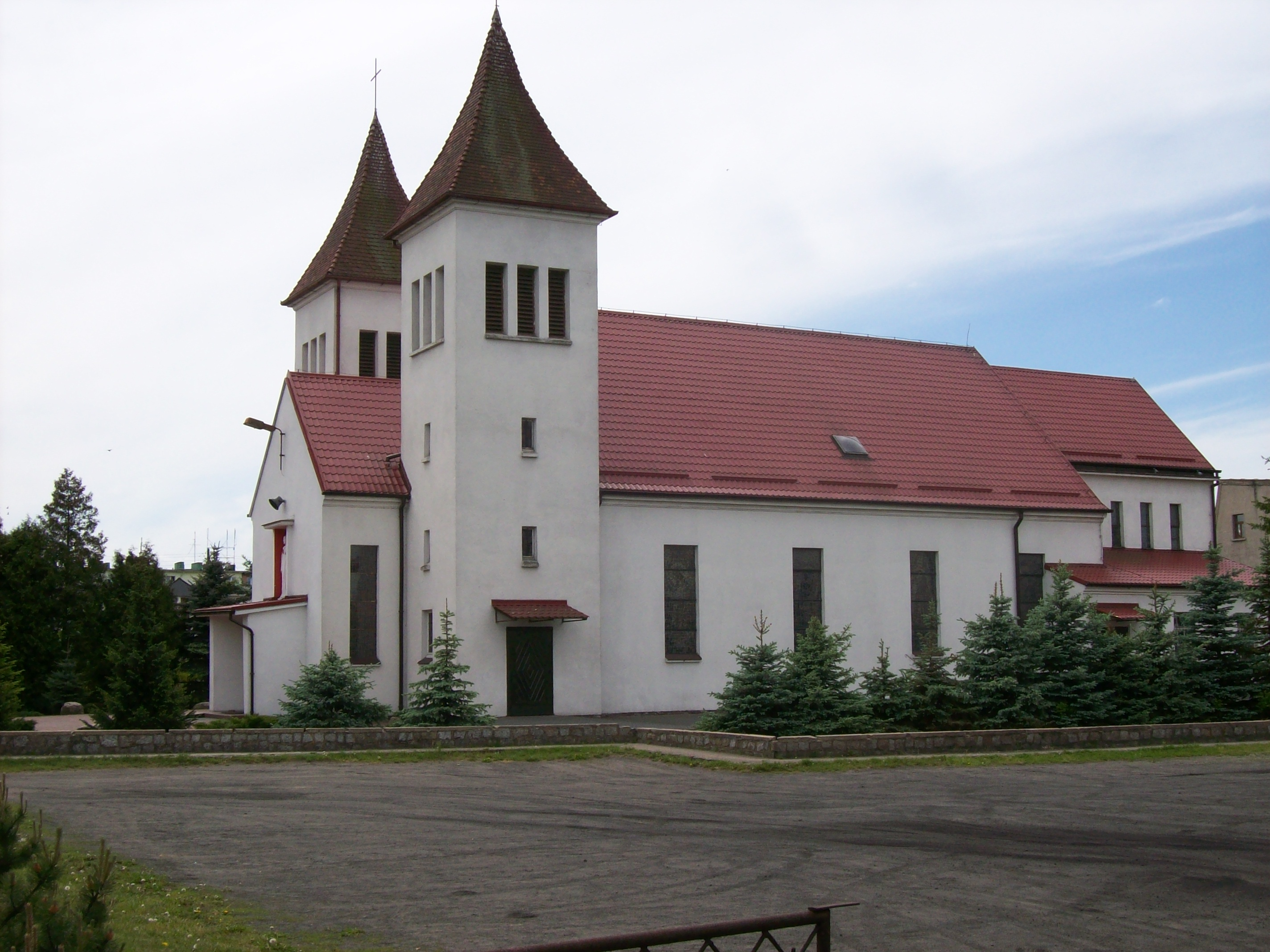 Kościół dwuwieżowy z 1936 r. w Krzyżu